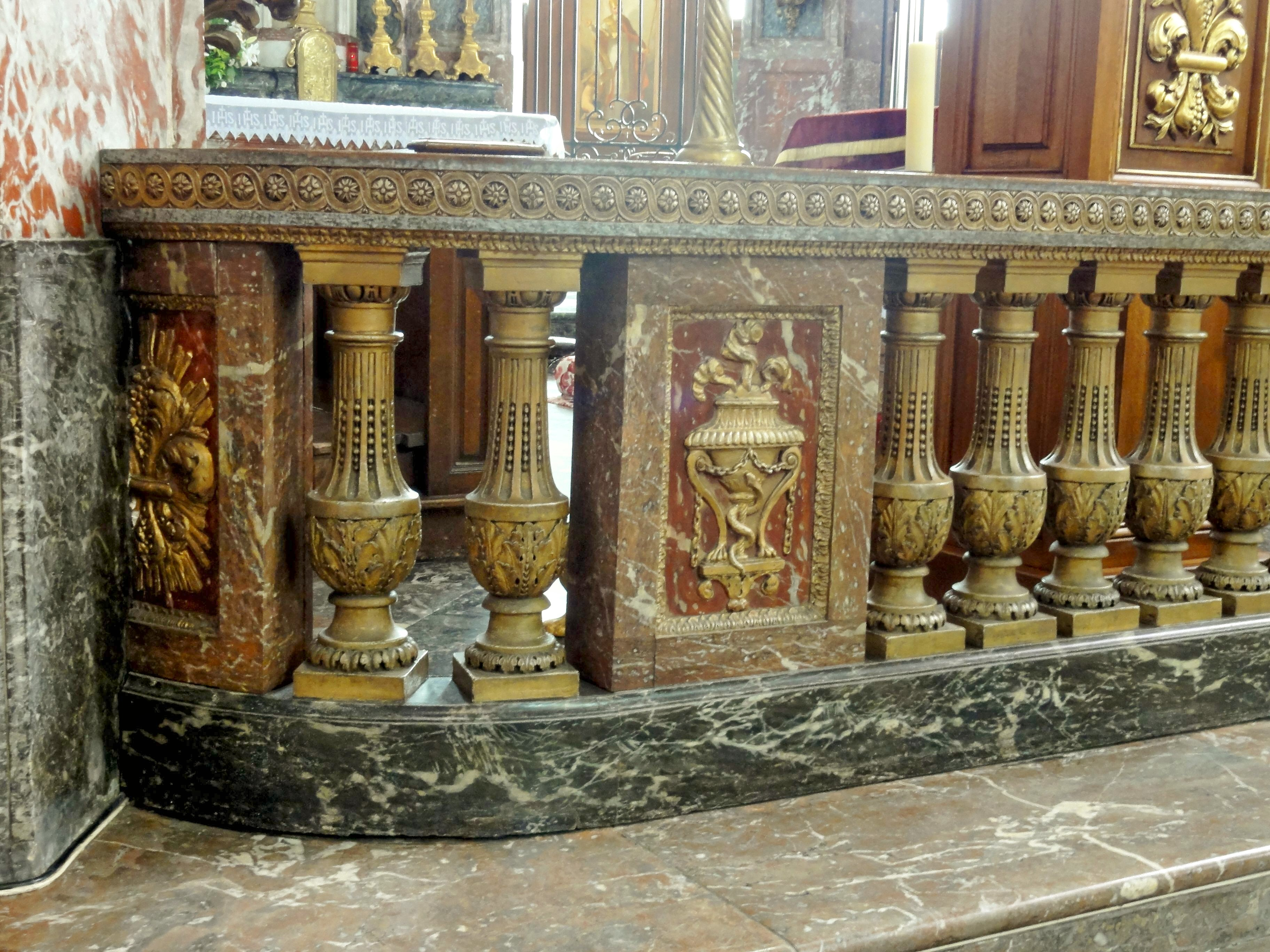 Ancienne clôture de lit de Louis XVI du palais de Compiègne.